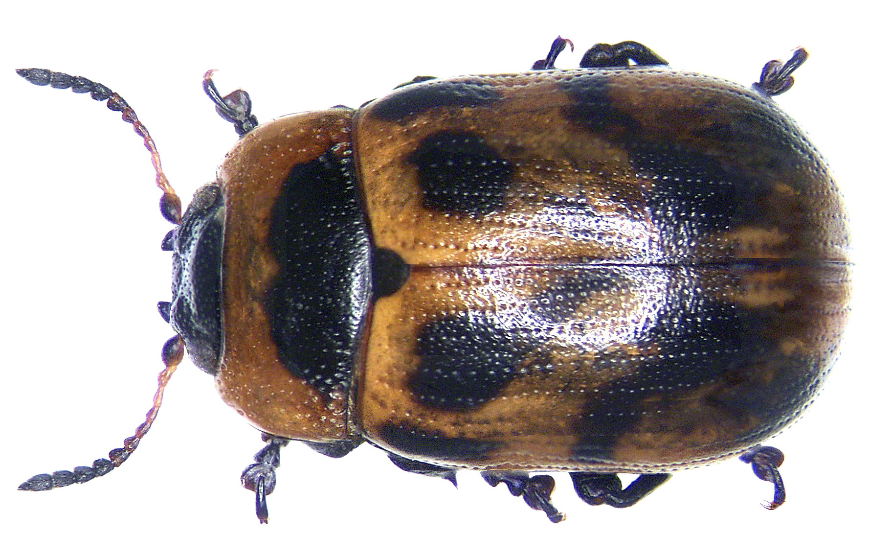 Gonioctena viminalis (Linné, 1758) Familie: Chrysomelidae Groesse: 5,5-7 mm Verbreitung: Europa Ökologie: an Salix-Arten Fundort: Germania, Bayern, Oberfranken, Kulmbach leg. det. U.Schmidt, 1972 Photo: U.Schmidt, 2005